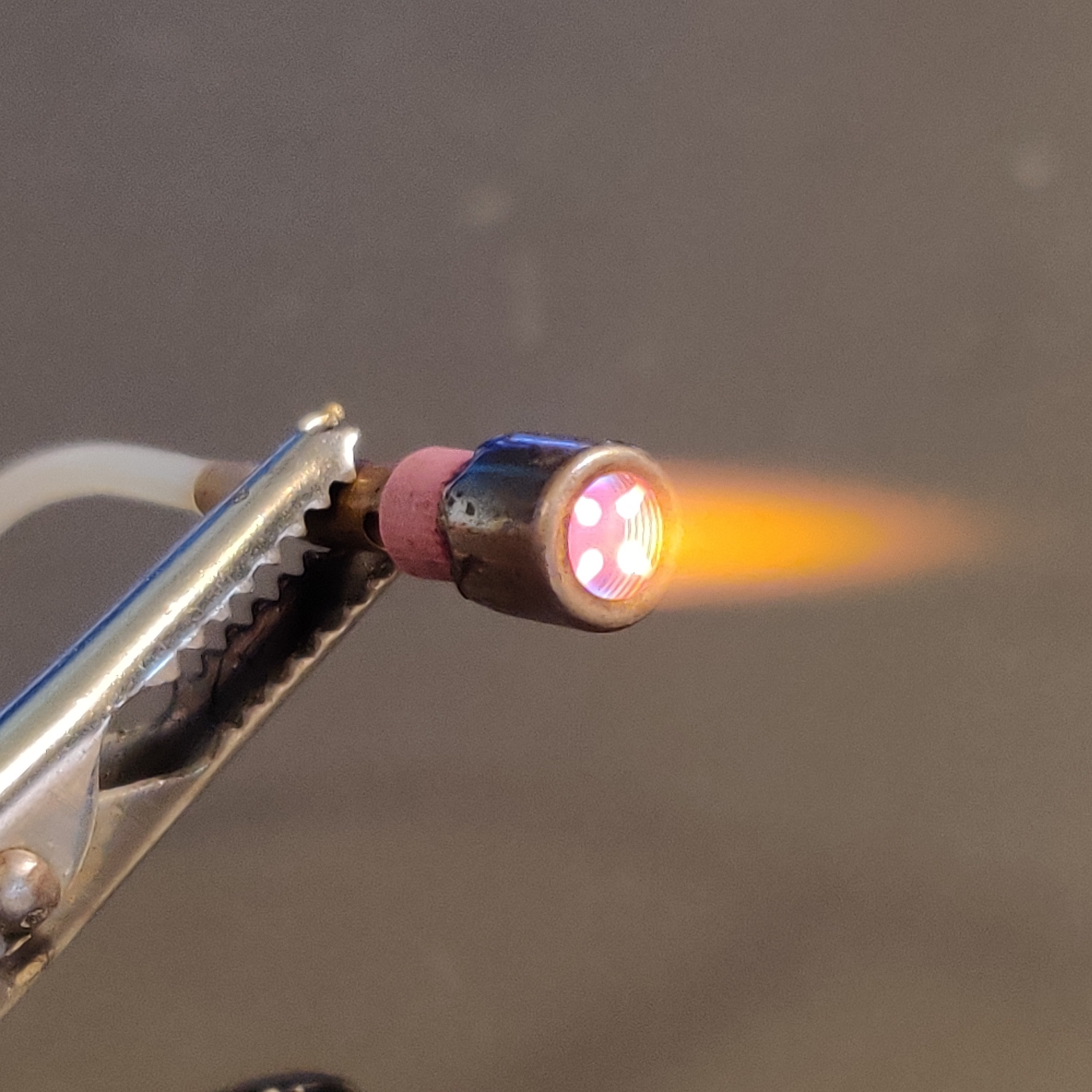 Kathalyse-Brenner